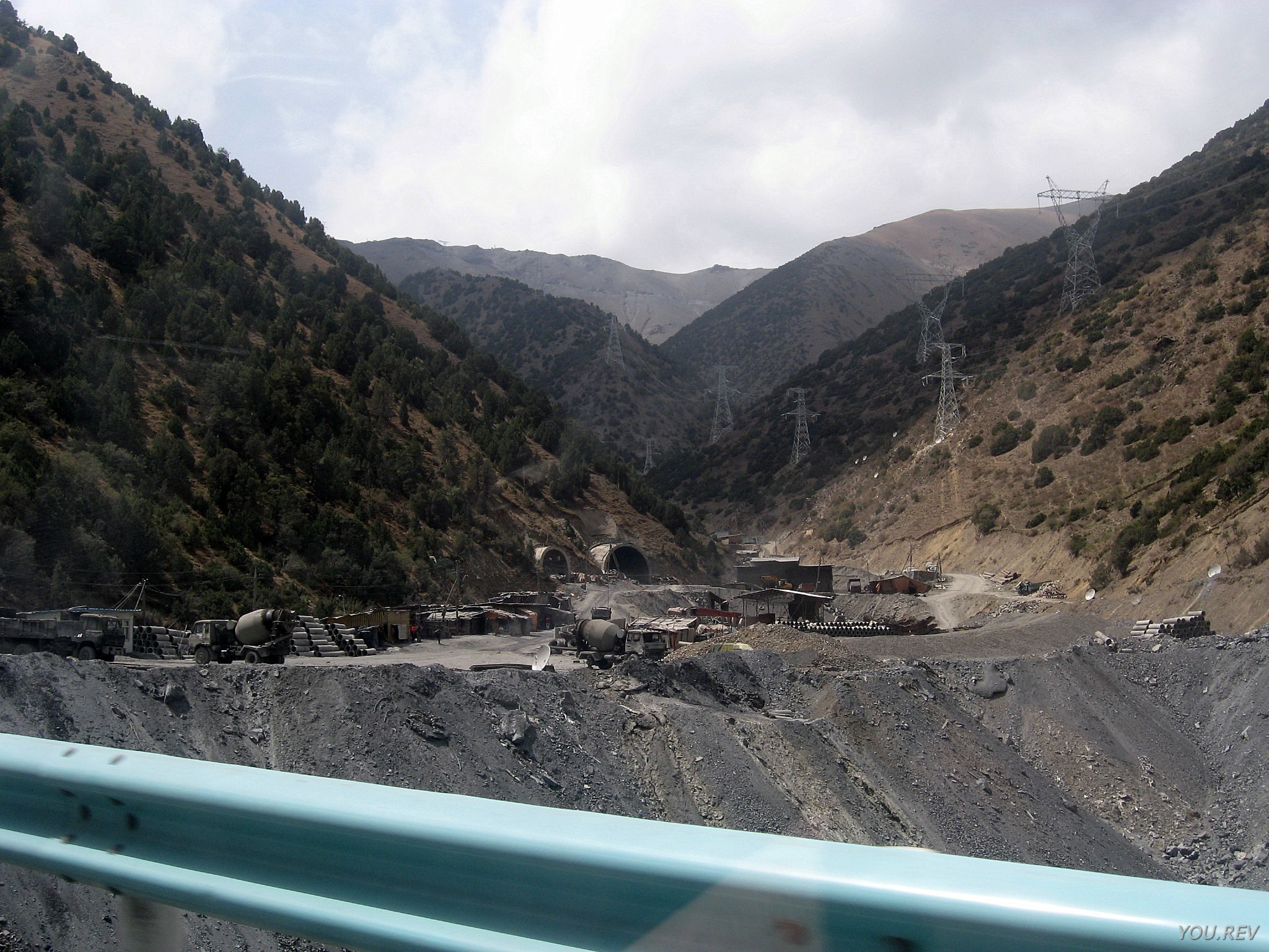 Строительство туннеля под перевалом Шахристан